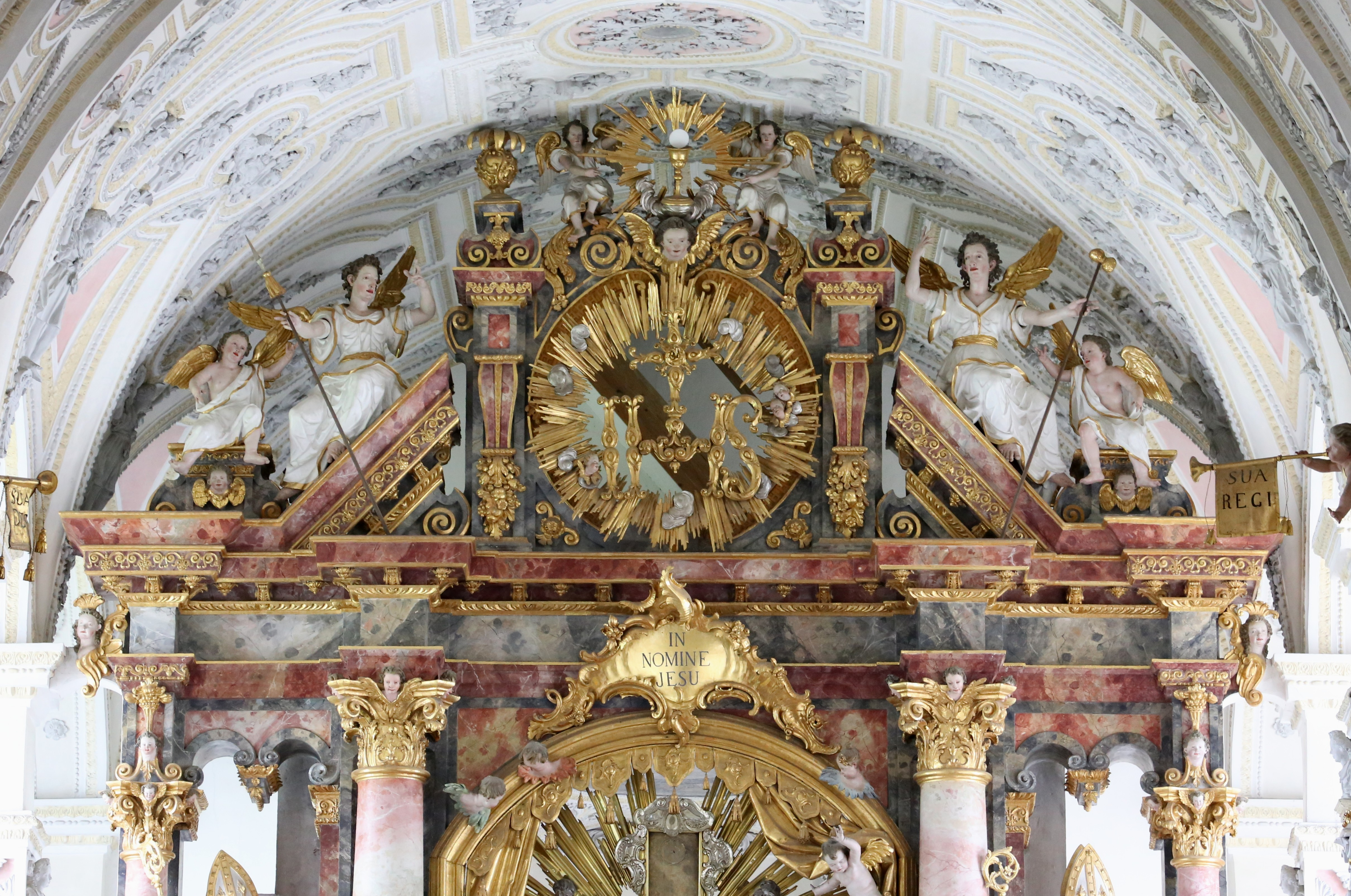 Kloster Polling; ehem. Stiftskirche St. Salvator und Hl. Kreuz, jetzt kath. Pfarrkirche, spätgotische Hallenkirche zu drei Schiffen mit stark eingezogenem gerade schließendem Chor und angefügten Nebenräumen, Neubau 1416/20, 1621/28 Barockisierung und Erweiterung nach Osten durch einen dreijochigen Umgangschor nach Plänen von Hans Krumpper, Neugestaltung der Westfassade 1727/28 durch Joseph Schmuzer, Turm im Stil der Renaissance nach Hans Krumpper 1603/10, Turmabschluss 1822 durch Oktogon mit Zeltdach; mit Ausstattung